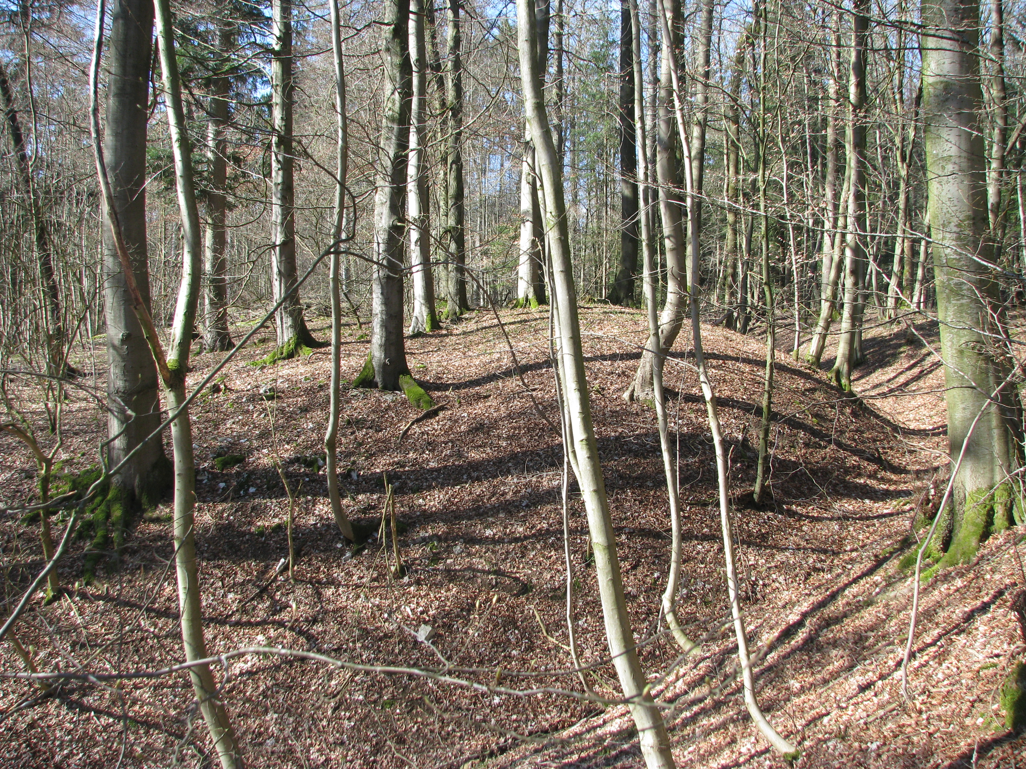 Rothenfels, Ortsteil von Deining im Landkreis Neumarkt in der Oberpfalz, Bayern, Burgstall